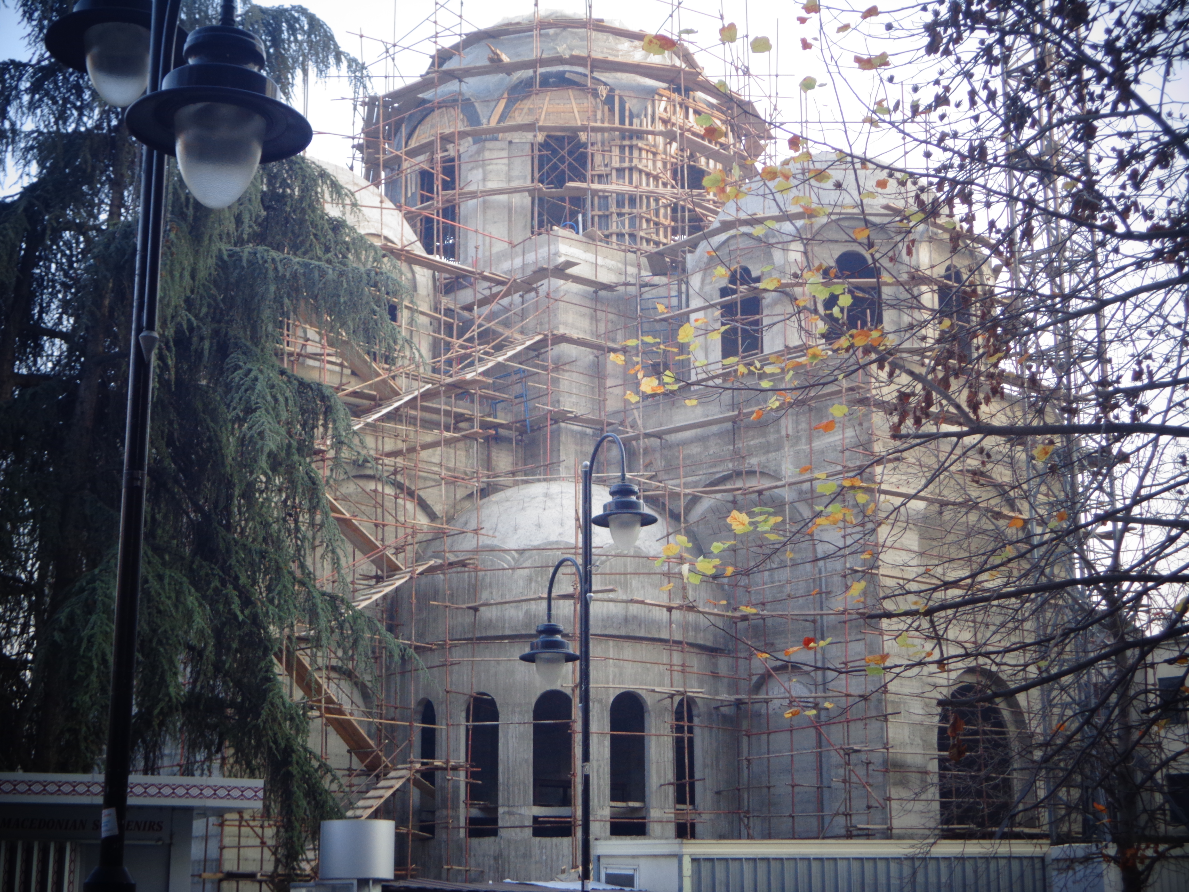 Црквата Свети Константин и Елена во изградба на улица Македонија во Скопје